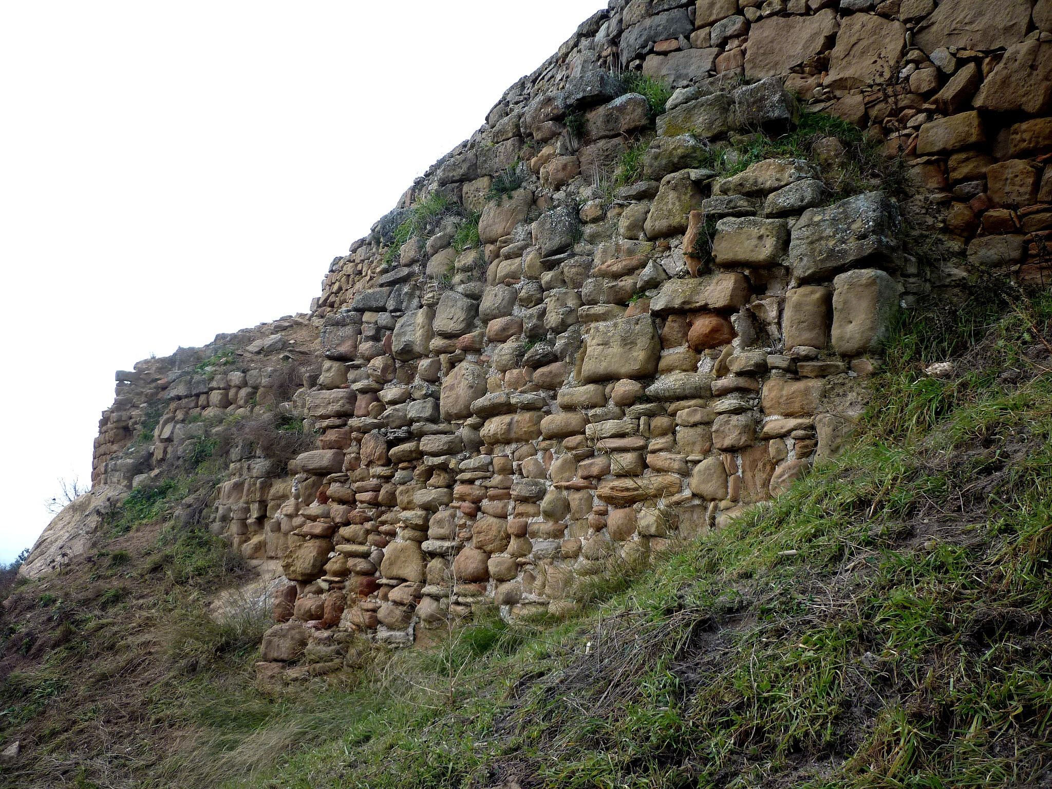 Castell de la Figuera de l'Aguda (Vilanova de l'Aguda). Restes de muralla